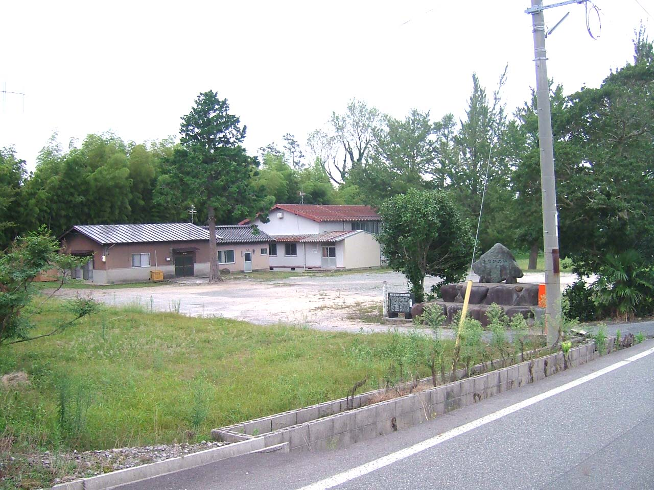 大山町立名和小学校大山農場分校跡地